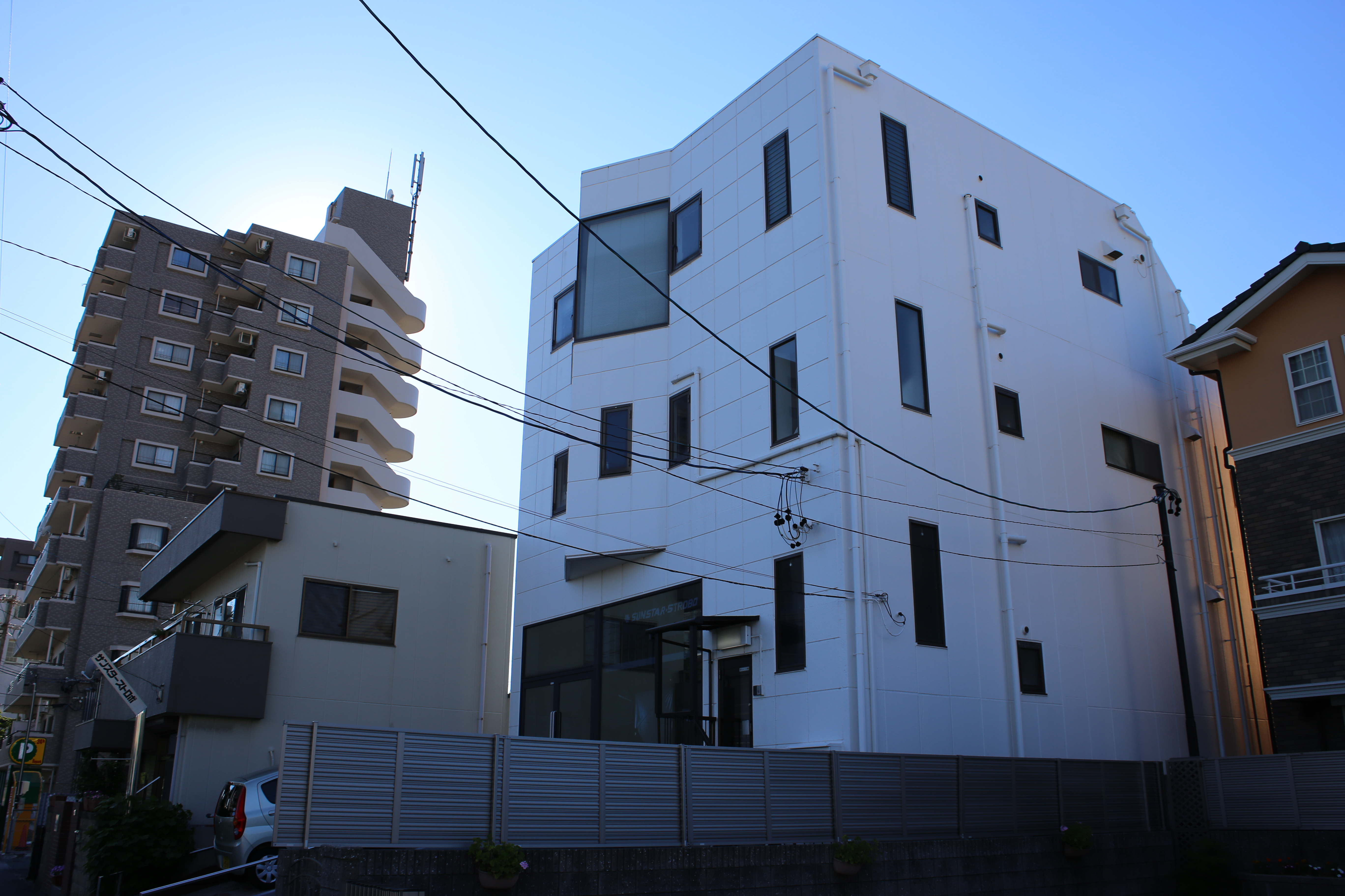 名古屋市昭和区藤成通のサンスターストロボ本社を南側公道（八熊通）東側より撮影